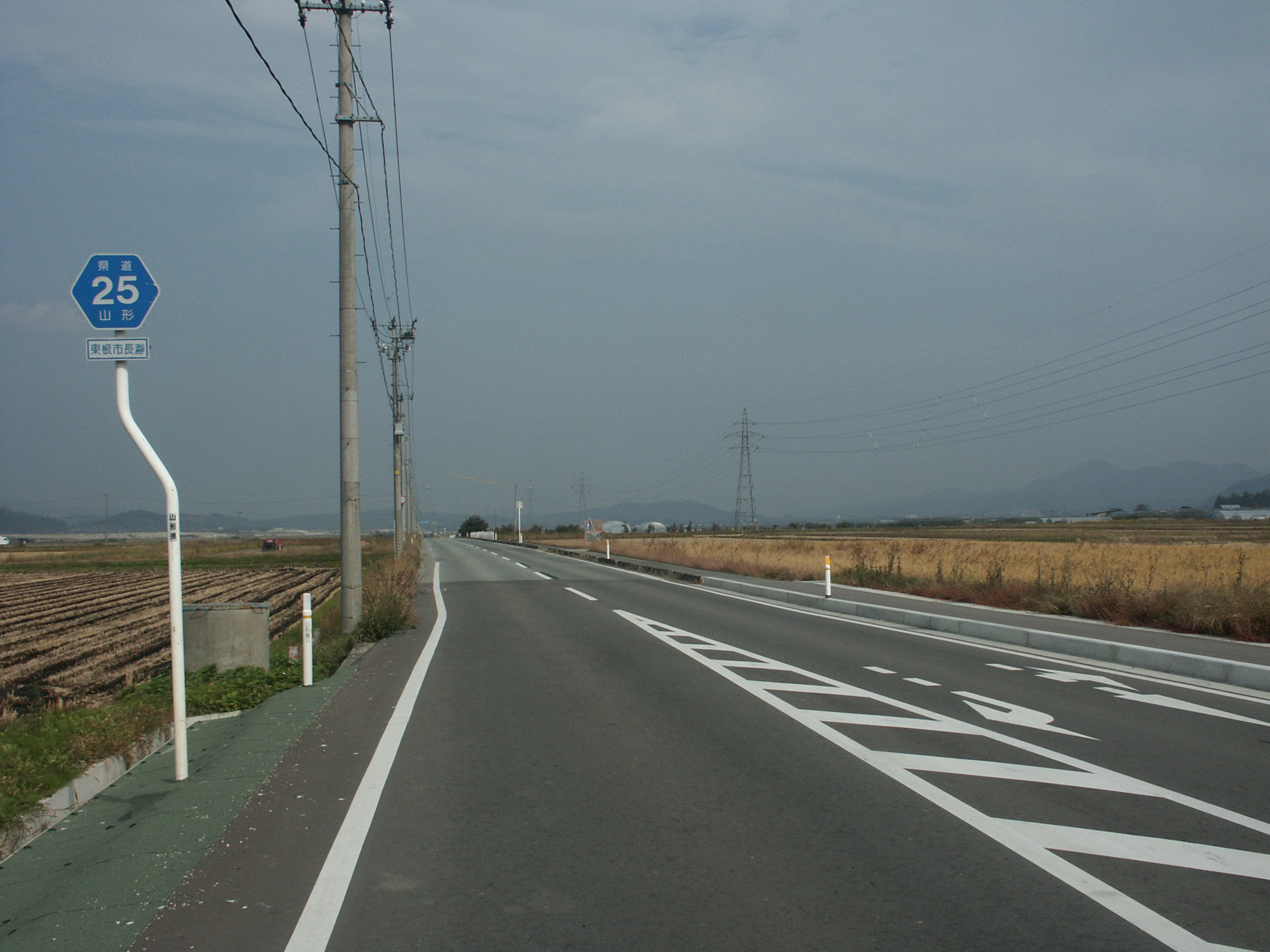 山形県道25号線東根市長瀞付近